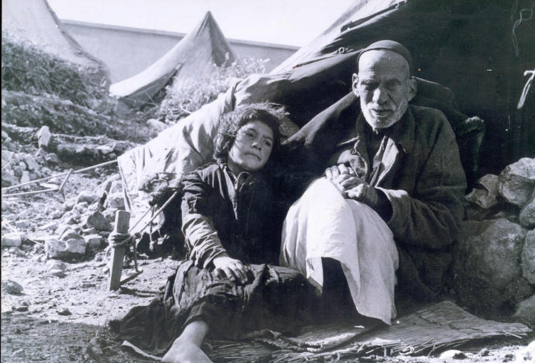 sudden refugees for ever, Palestine Nakba 1948